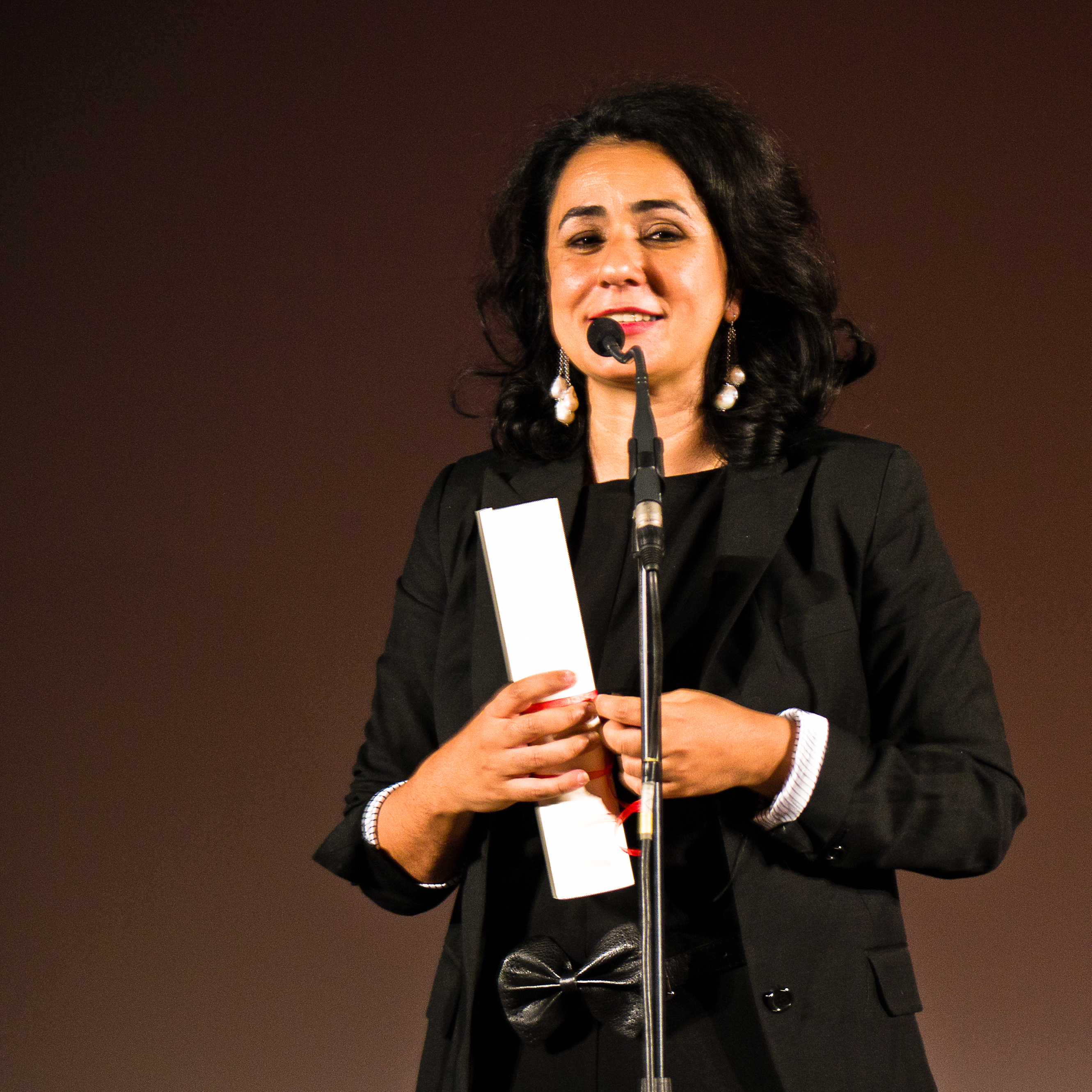 Leïla Kilani (Sur la planche), Prix du jury mention spéciale du festival Paris Cinéma 2011 Festival Paris Cinéma 2011.